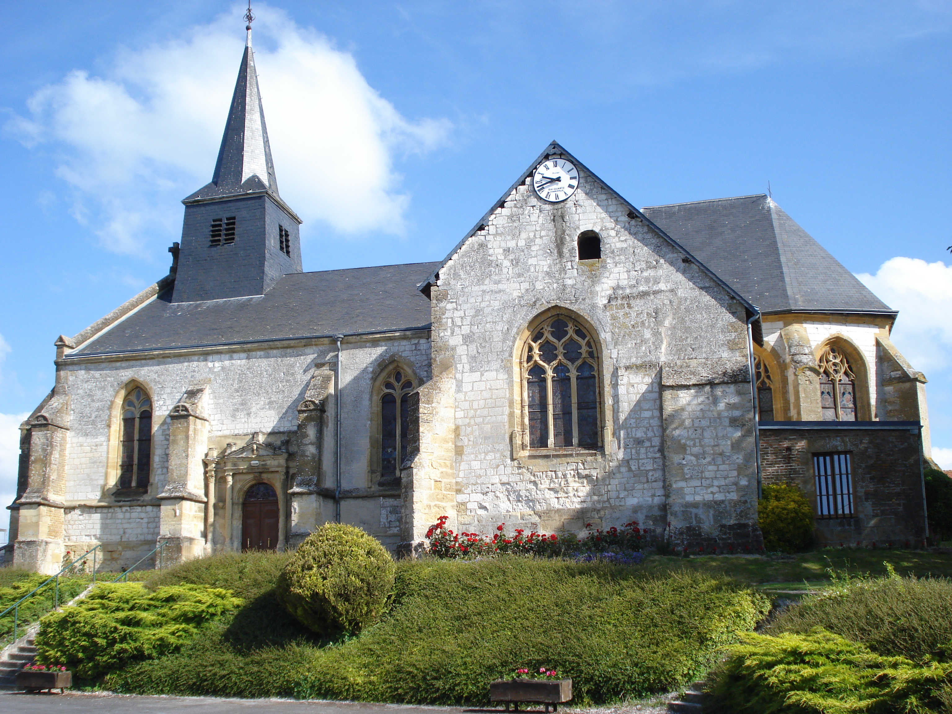 Leffincourt (Ardennes, Fr) l'église